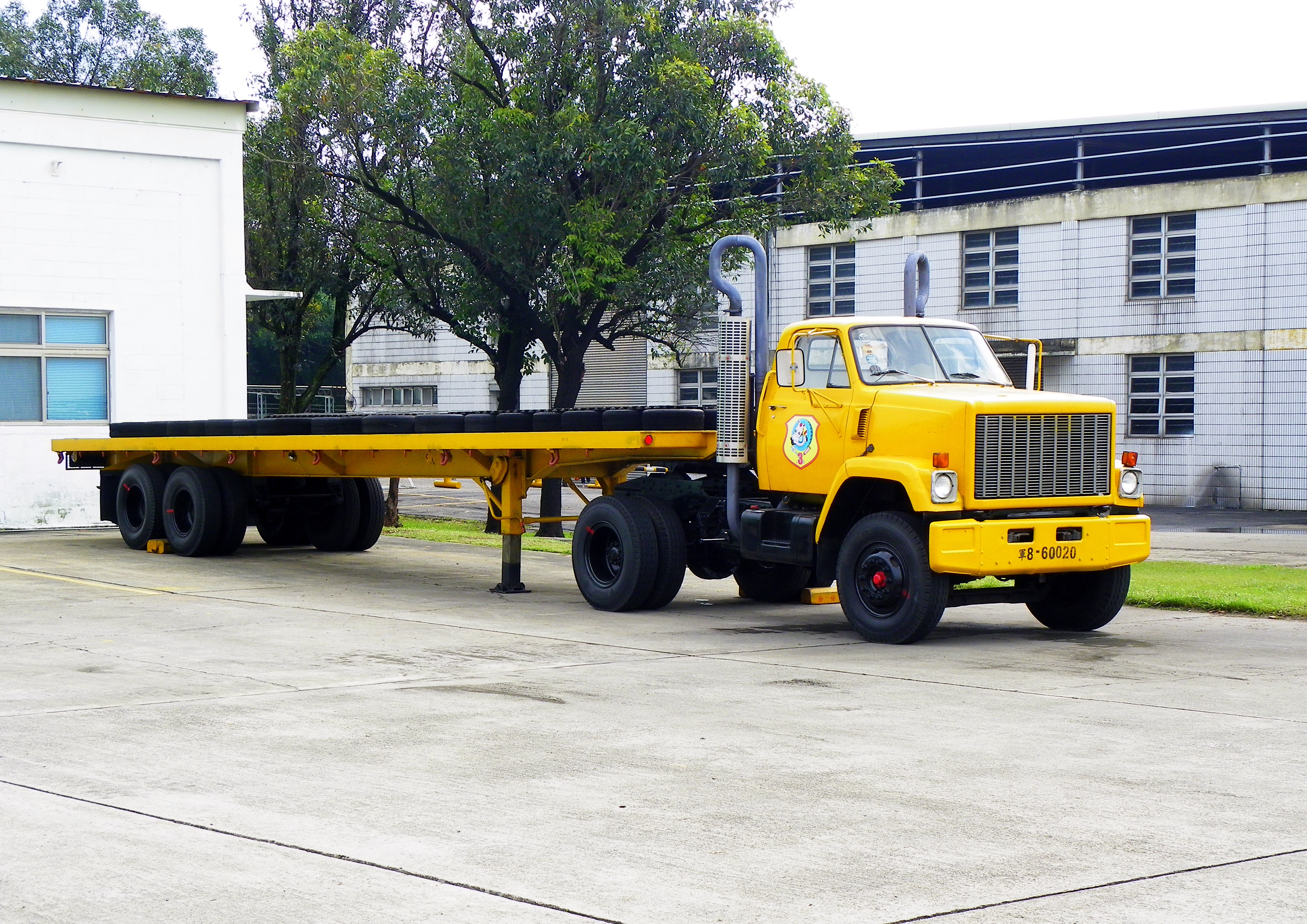 空軍清泉崗基地消防中心前，搬運噴射引擎、航空機等大型機材的GMC重型拖車。